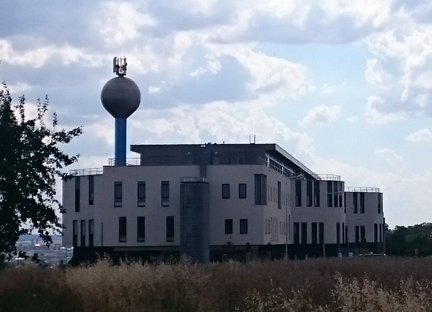 Nová budova Národního ústavu duševního zdraví v Klecanech. Česká republika.